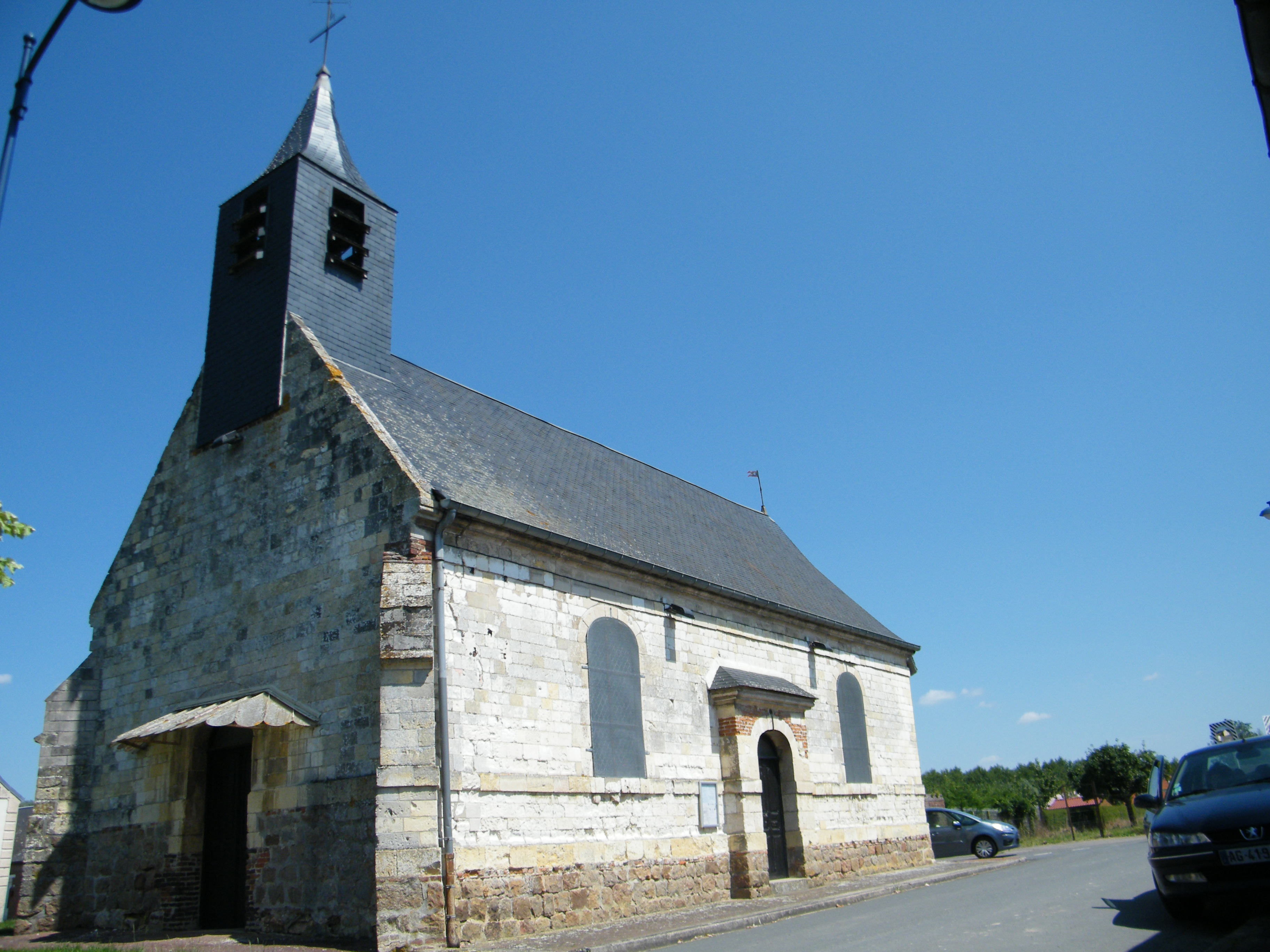 Saint-Martin.